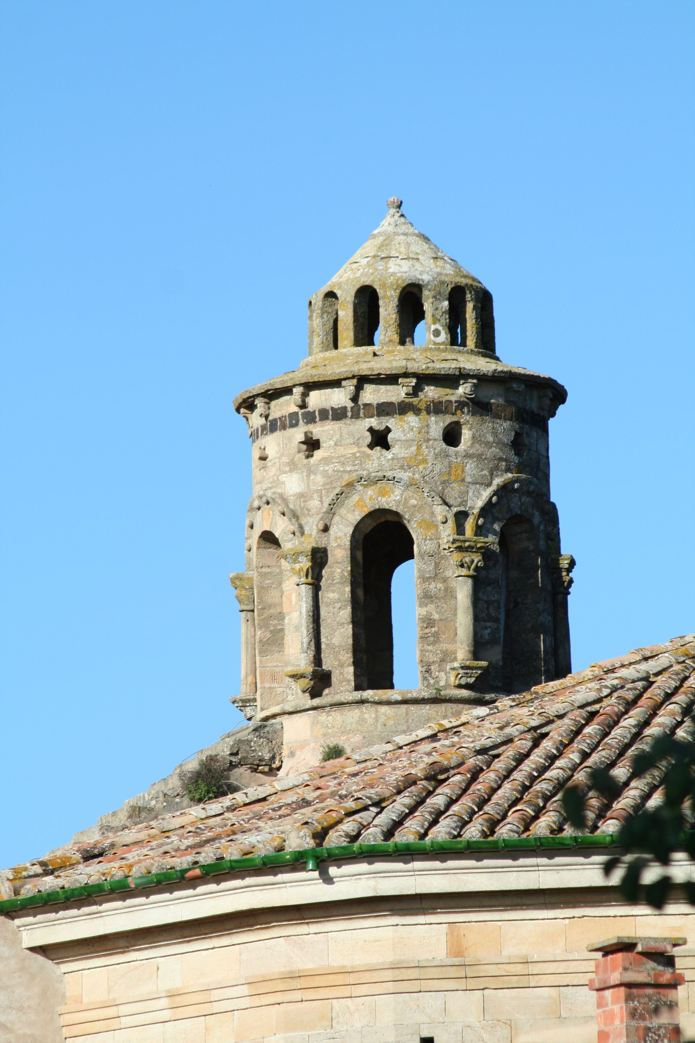 Roujan (Hérault) - Abbaye de Cassan (Château de Cassan) - église romane Sainte-Marie - clocheton - art roman.